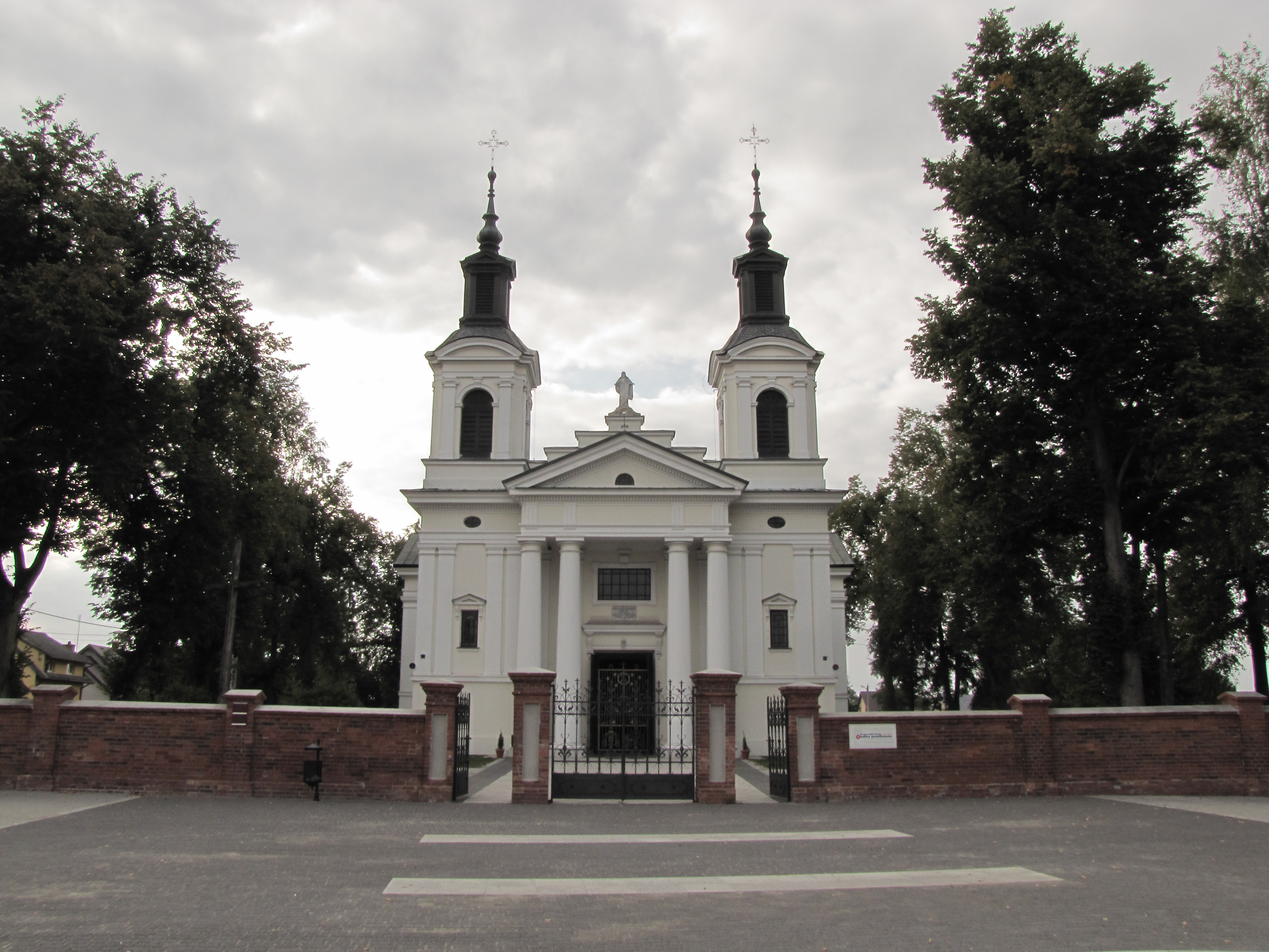 Wohyń - kościół parafialny p.w. św. Anny Samotrzeciej, mur., 1837-1840 (zabytek nr rejestr. A-228)